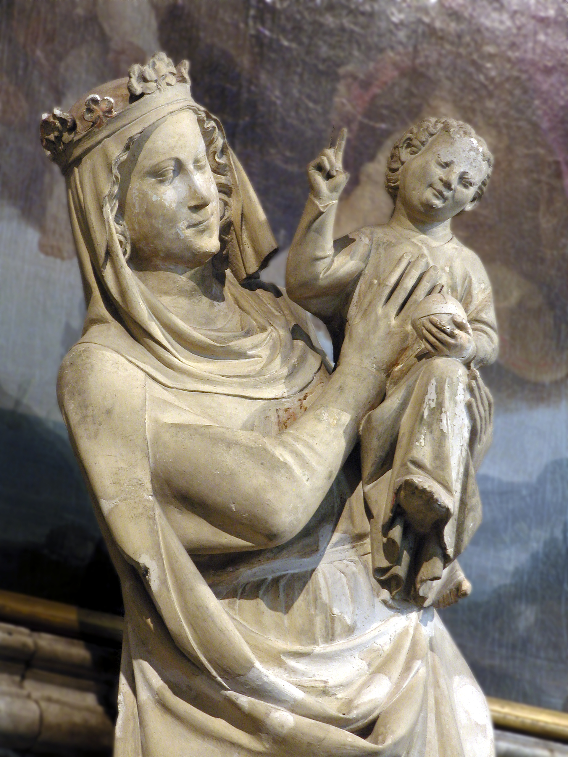 Onze Lieve Vrouw ter Potterie, mirakelbeeld, Brugge ca. 1400